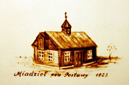 Беларуская (тарашкевіца): Мядзел (Miadzieł). Мячэт